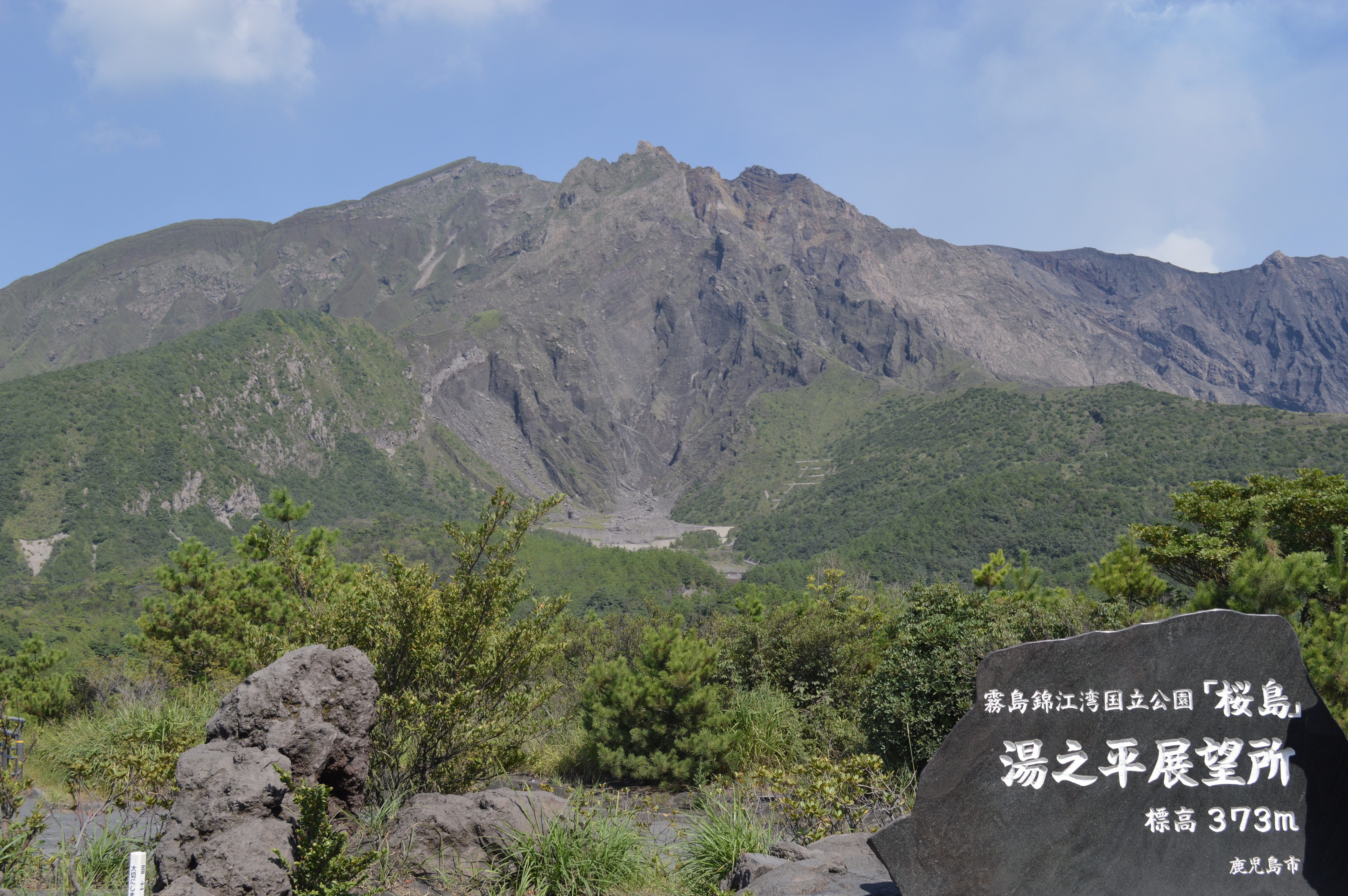 鹿児島市の桜島、湯之平展望所